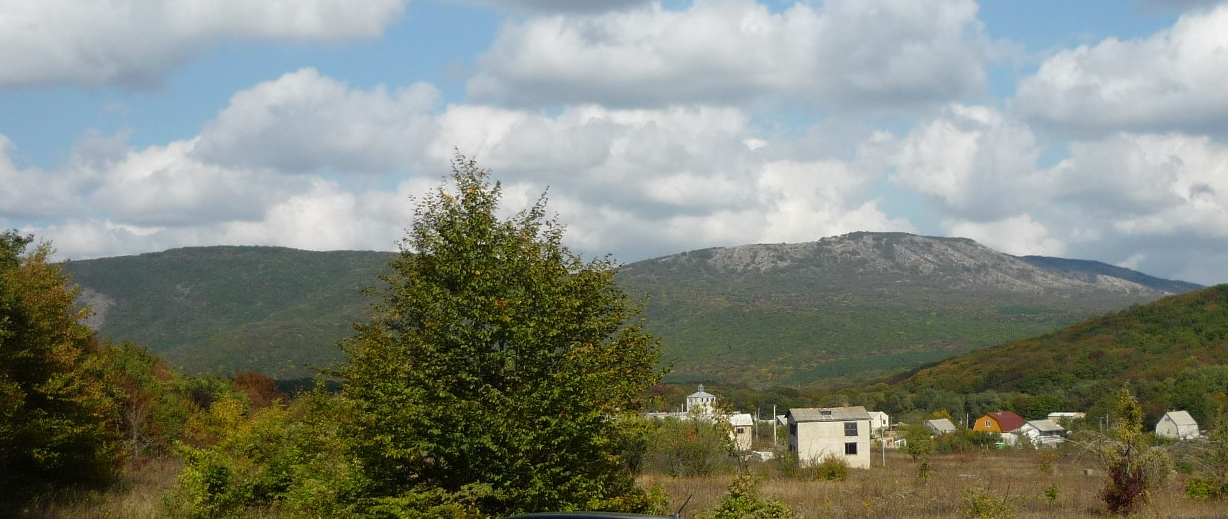 Вид на Агармыш из Лесной Поляны. Слева г. Шпиль, справа г. Большой Агармыш, за ним виднеется покрытый лесом г. Малый Агармыш